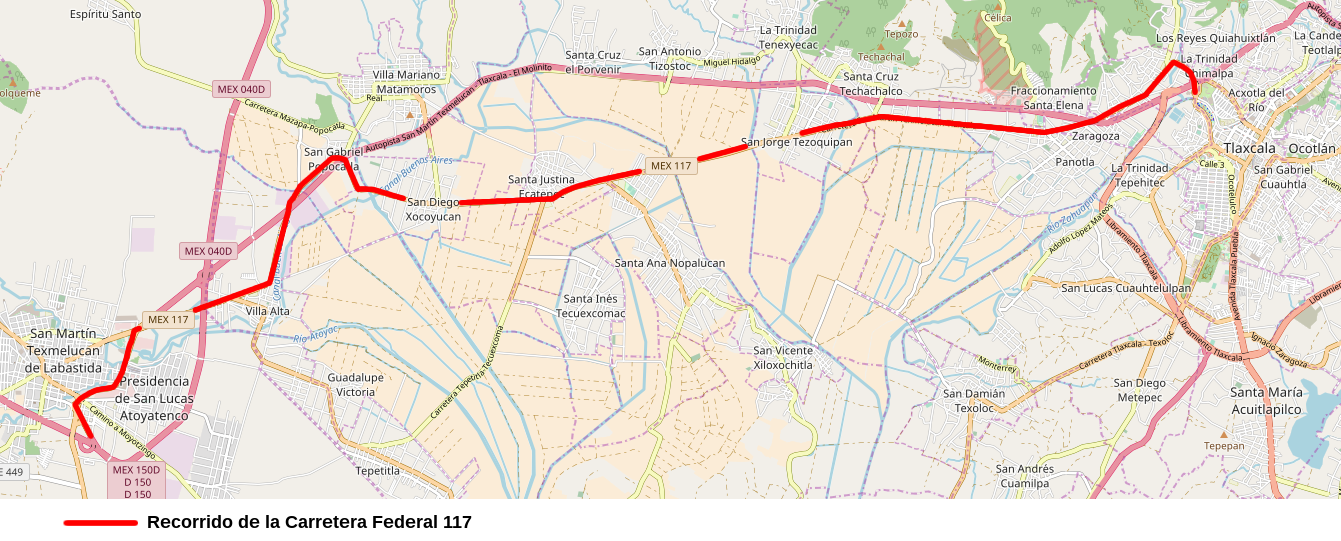 Recorrido de la Carretera Federal 117 de San Martín Texmelucan a Tlaxcala de Xicohténcatl